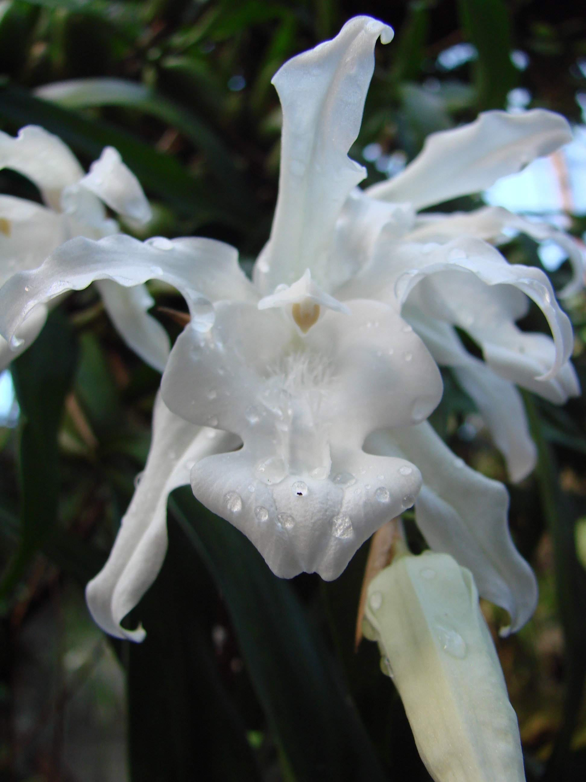 Jardin botanique de l'Université de Zurich (Suisse) : Coelogyne cristata var. hololeuca Lindl. (1821)